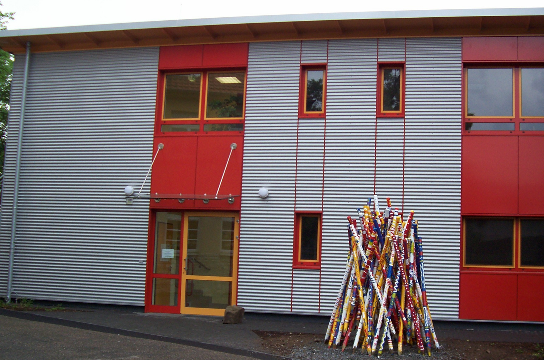 OGaTa Bergisch Gladbach Hand